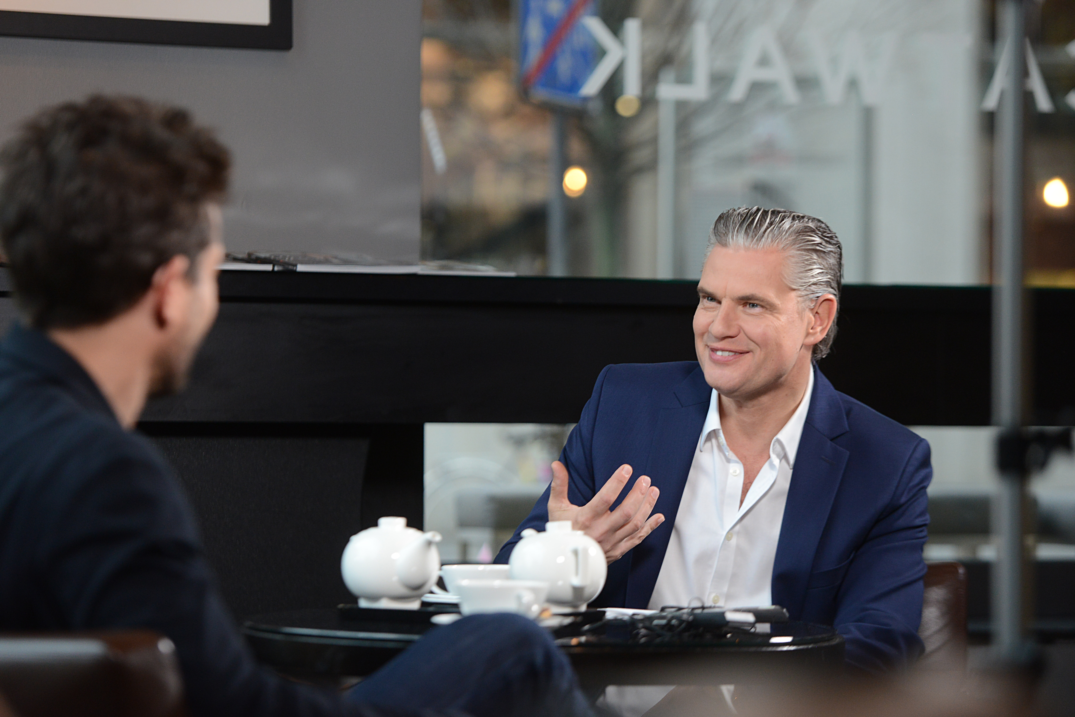 Ingo Hoppe im Interview mit dem Schauspieler Oliver Mommsen